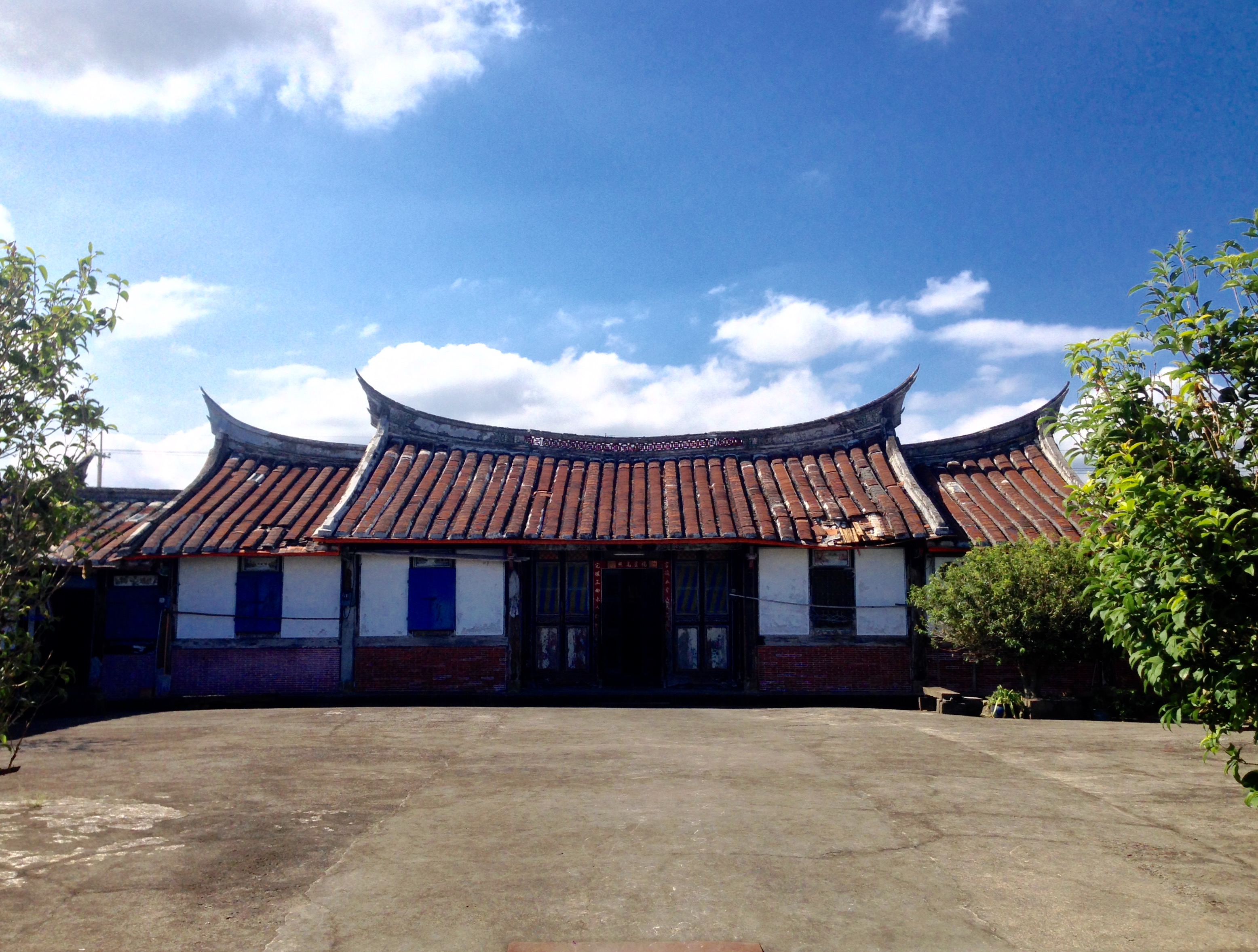 中文（台灣）: 大三鬮林宅